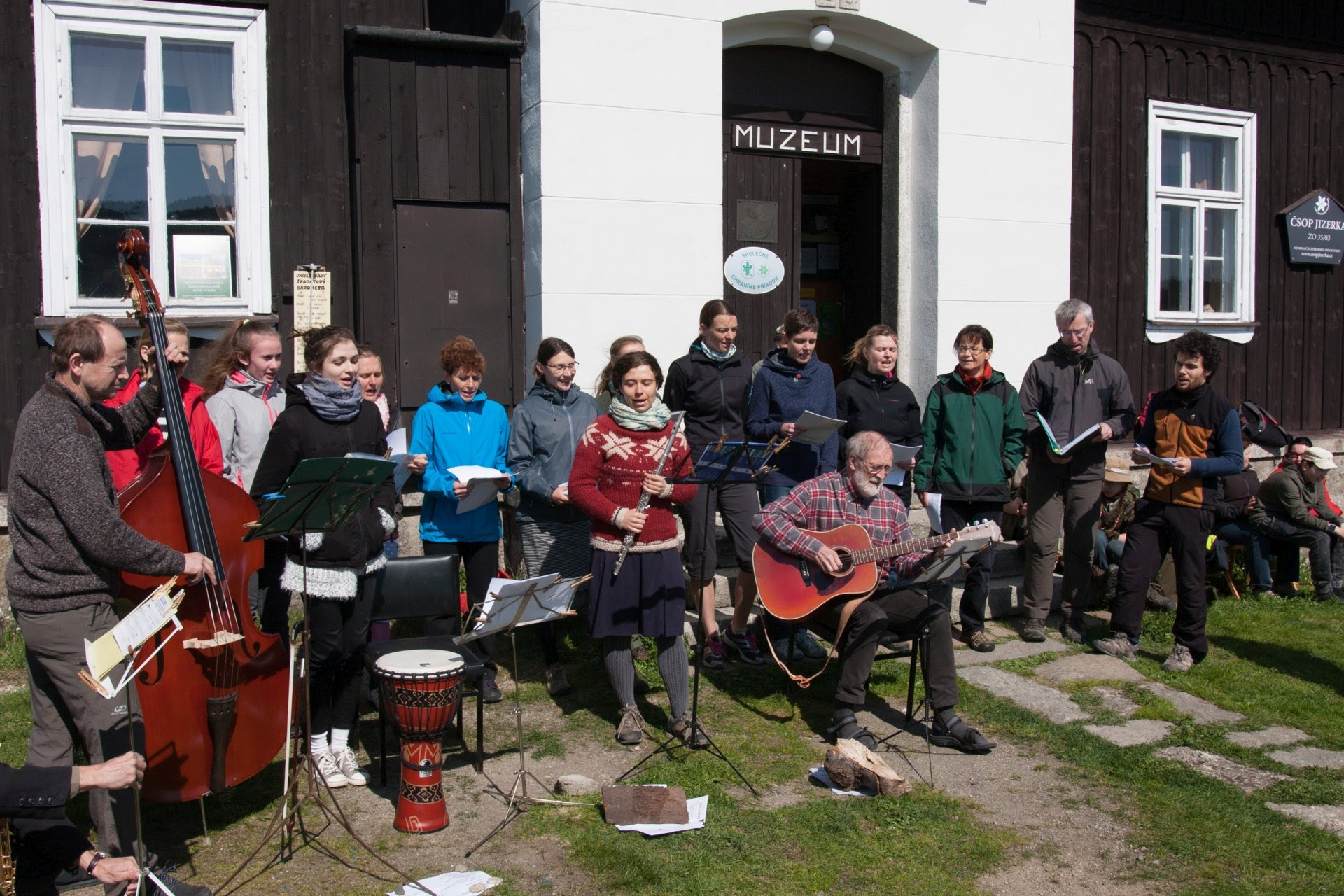 Skupina při otvírání muzea na Jizerce v roce 2018